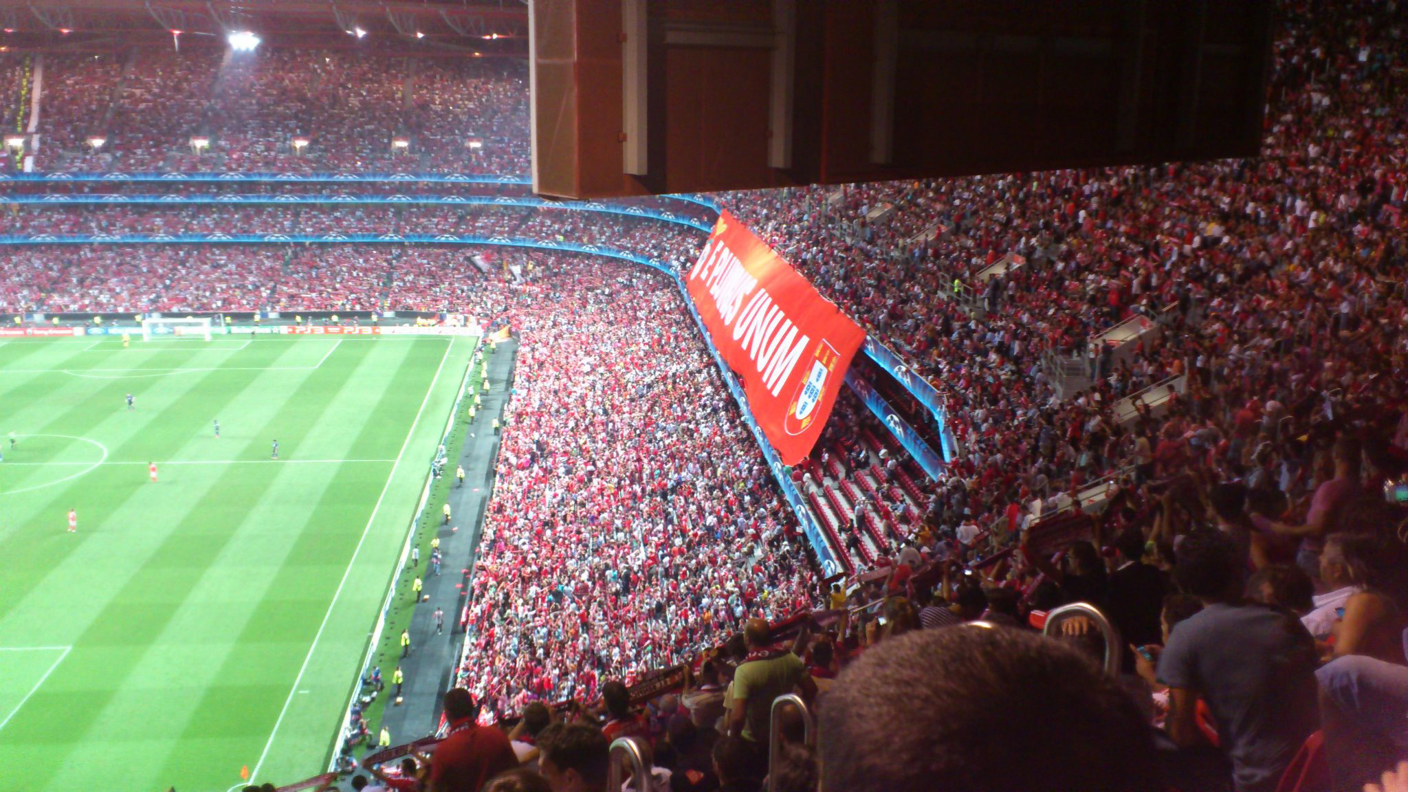 Estádio da Luz durante o jogo da Liga dos Campeões Benfica-Manchester United